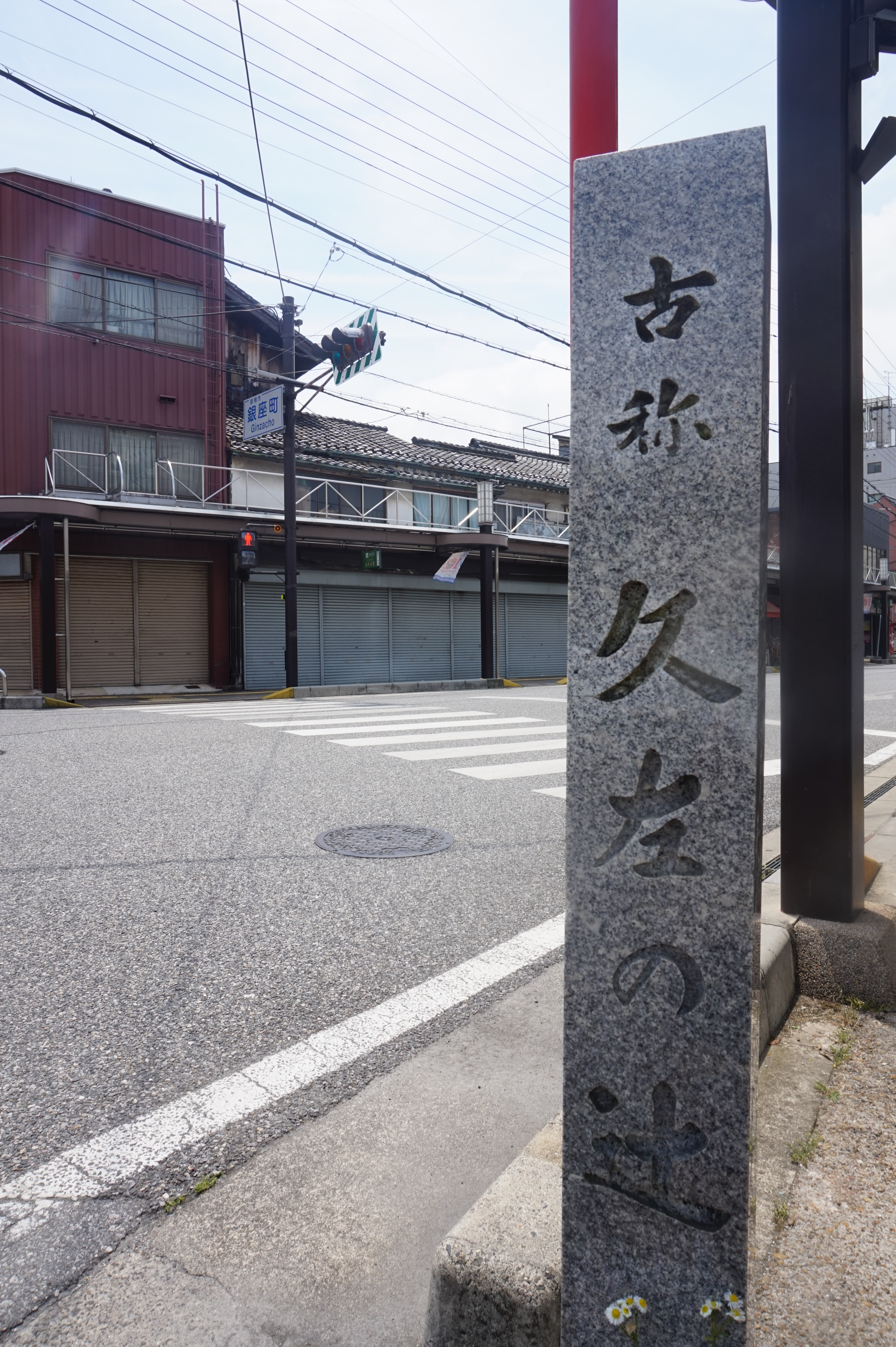 滋賀県彦根市銀座町の久左の辻。